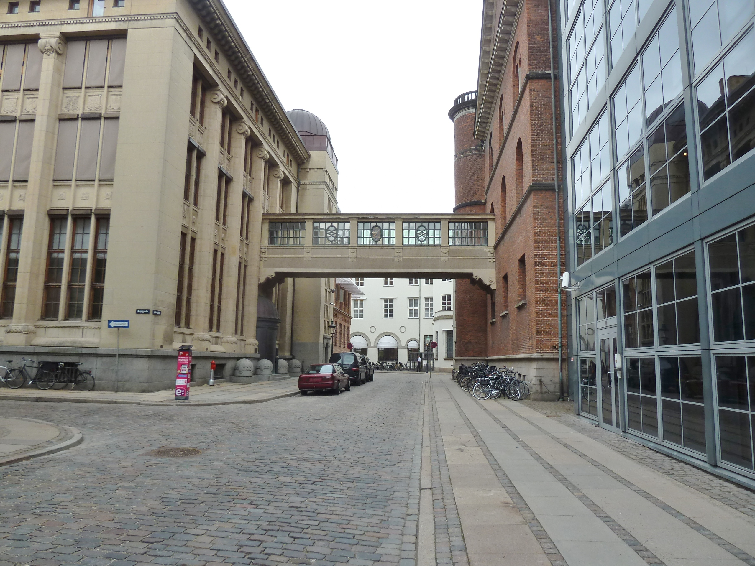 The street Laksegade in Indre By in Copenhagen.